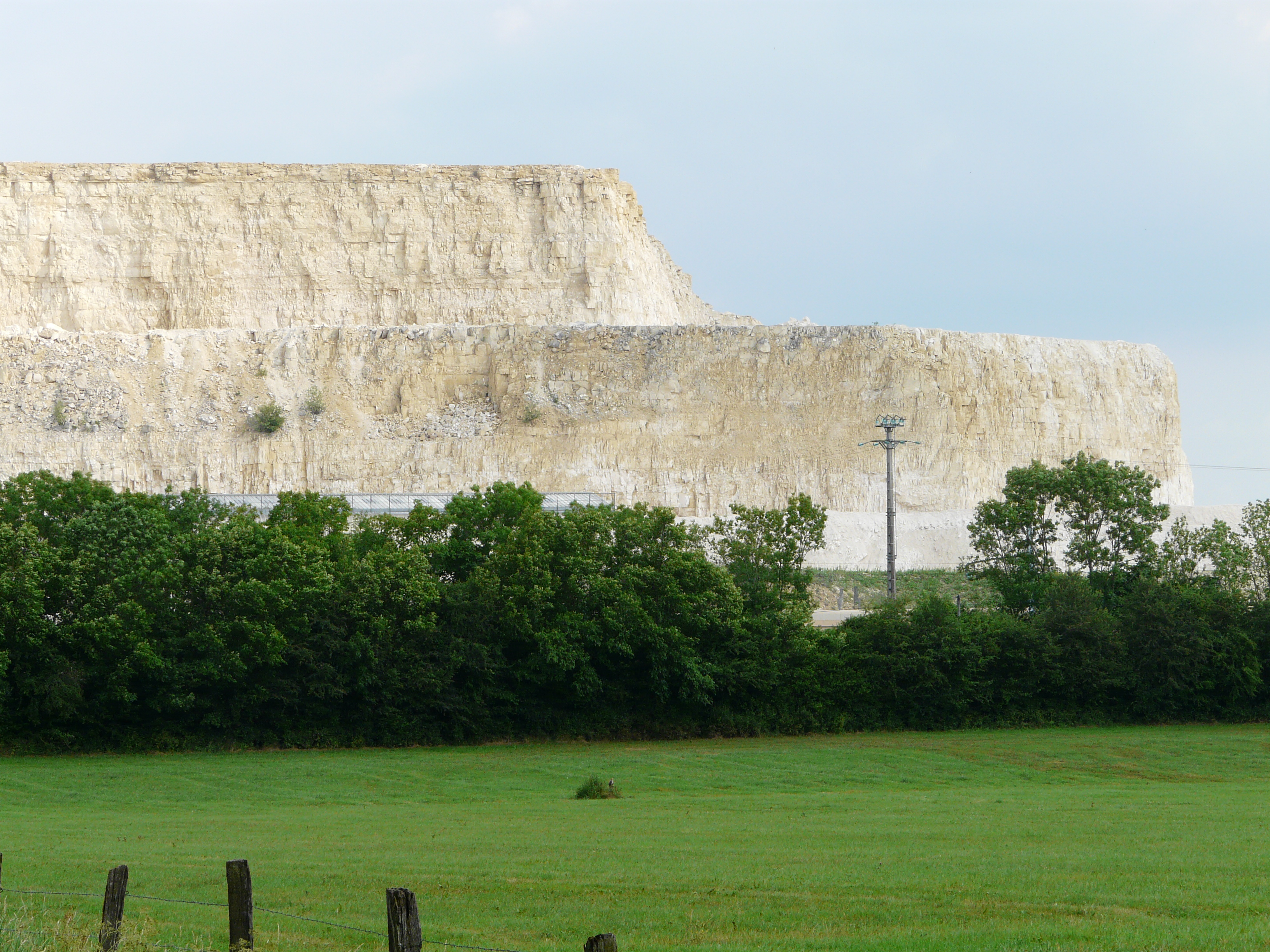 Vue de la carrière Solvay à Saint-Germain-sur-Meuse (Meuse, France)